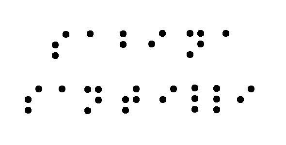 Il nome di Sabina Santilli (fondatrice delle Lega del filo d'oro) in alfabeto braille